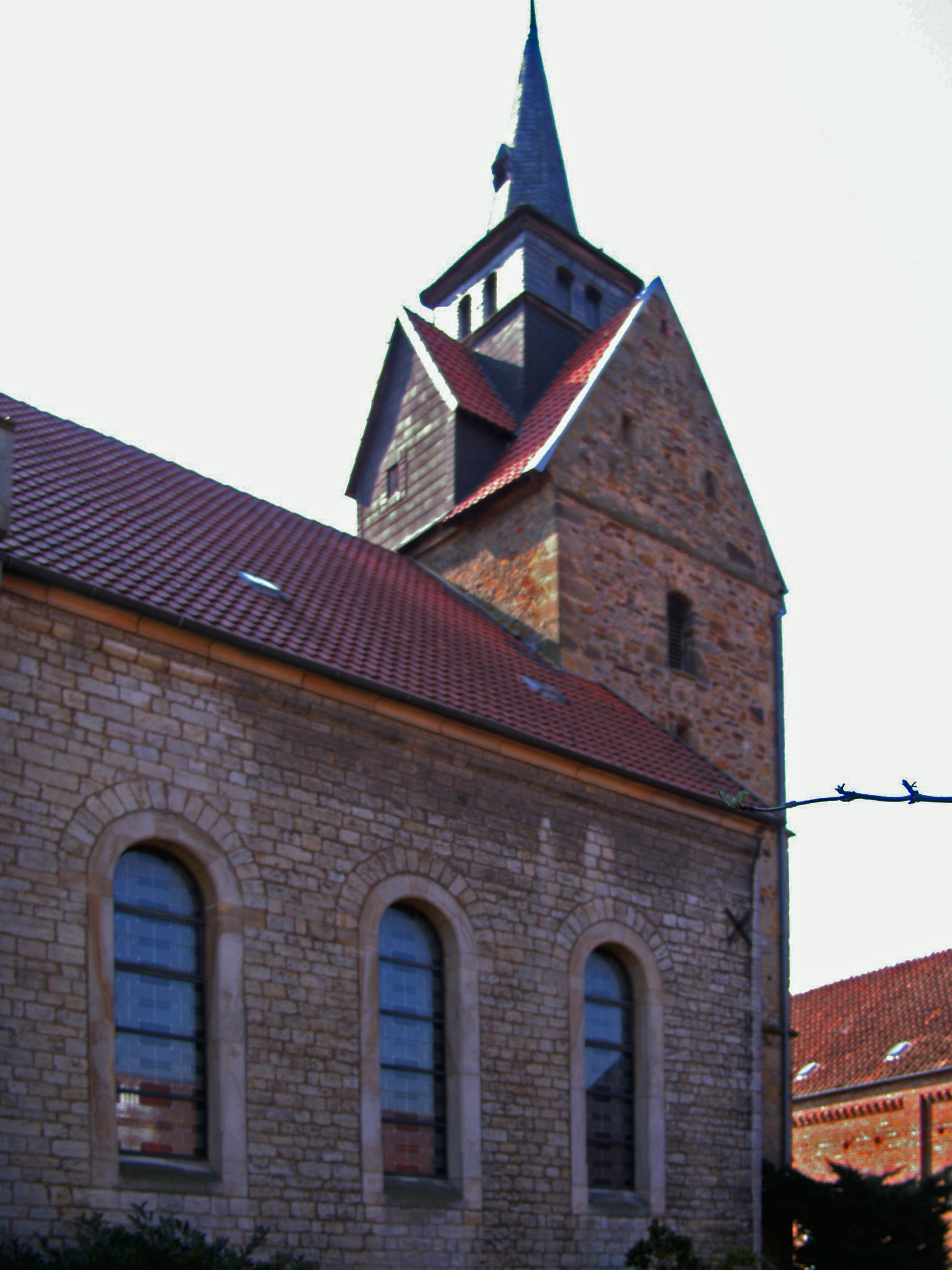 Katholische Kirche Maria Himmelfahrt in Söhre, Ortsteil von Diekholzen